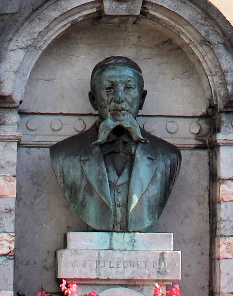 Denkmal in Warsage, einem Ortsteil von Dalhem in Belgien. Das Denkmal ehrt vier Generationen der Bürgemeister-Familie Fléchet. Hier Ferdinand Fléchet.